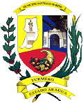 Escudo del municipio Santiago Mariño. Estado Aragua. Venezuela